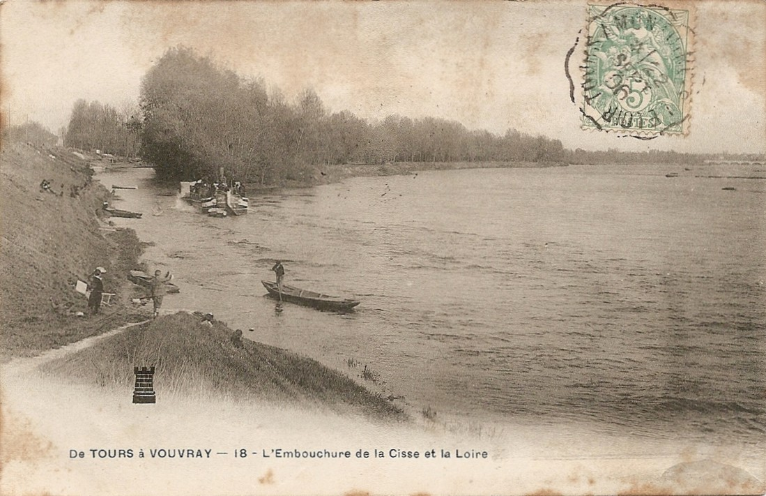 Carte postale ancienne "précurseur", postée en 1906. Logo de l'éditeur = tour. Sans autre mention d'auteur ou d'éditeur.